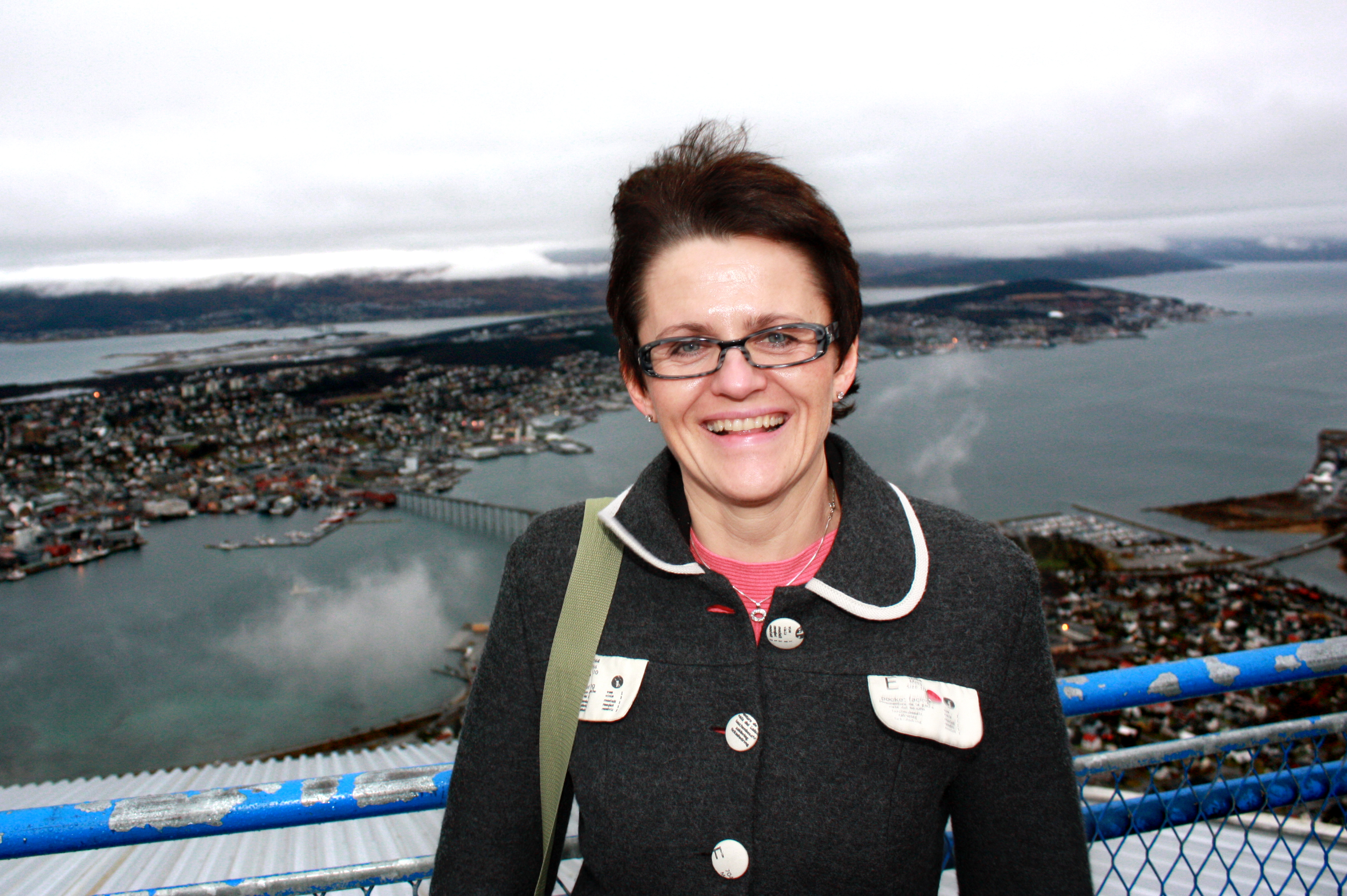 Fiskeri- og kystminister Lisbeth Berg-Hansen i Tromsø i 2009.